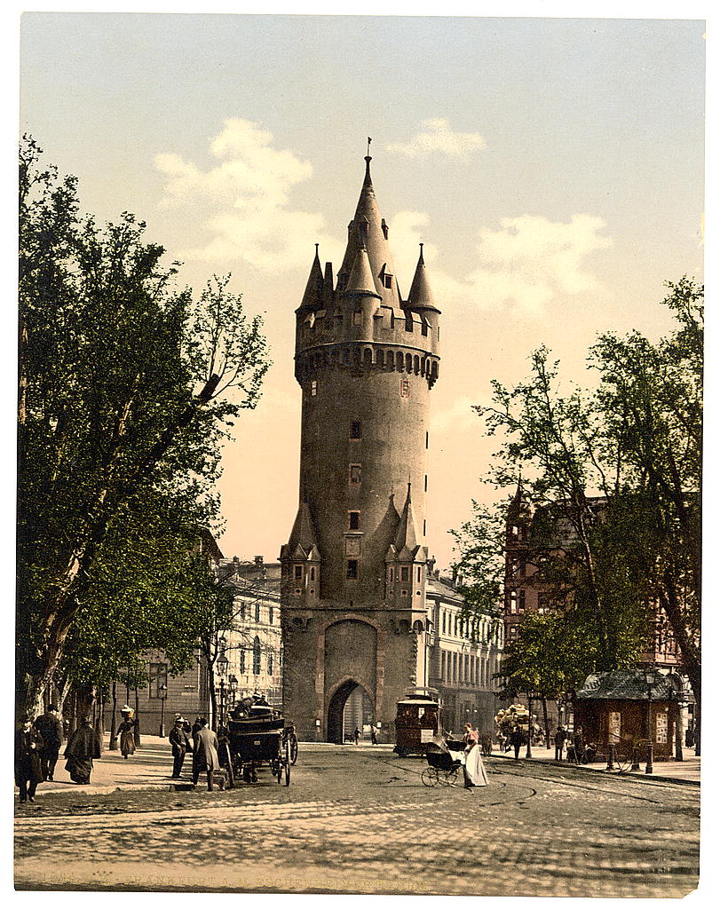 Der Eschenheimer Turm am Eschenheimer Tor um 1900 Library of Congress Kategorie:Bild:Torturm